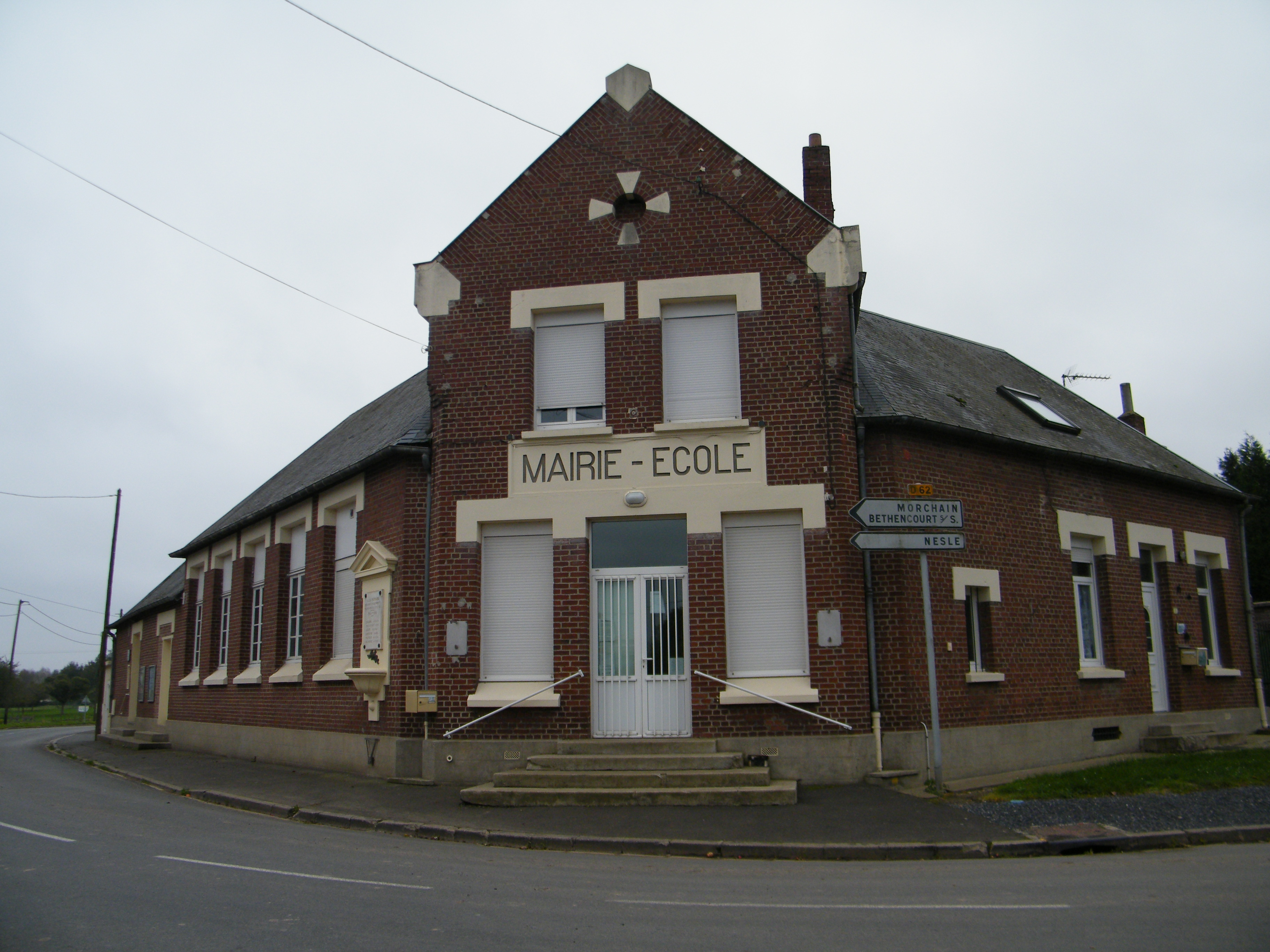 Bâtiments communaux, mairie.